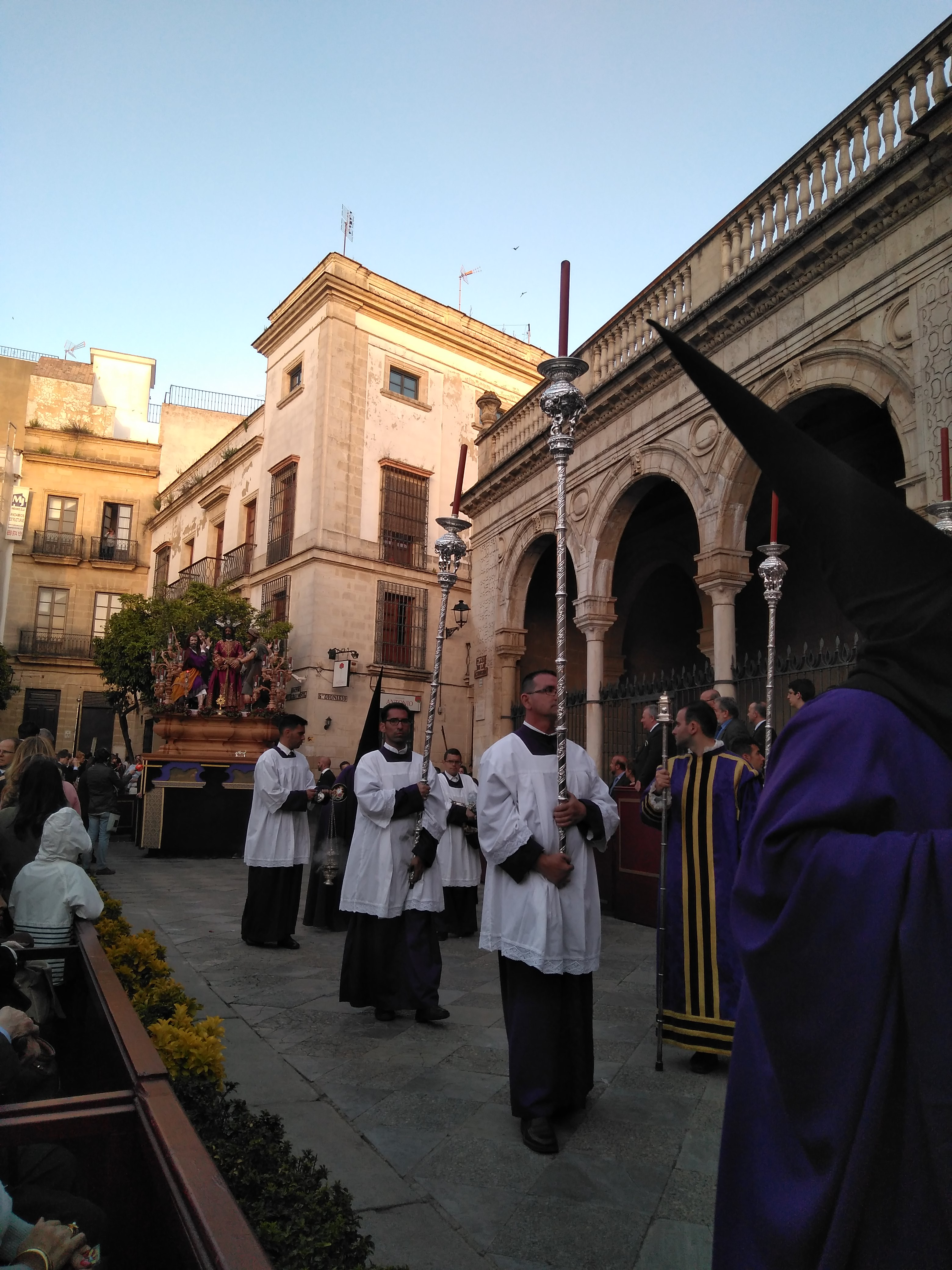 paso de la hermandad de La Pasión en Jerez de la Frontera (España)